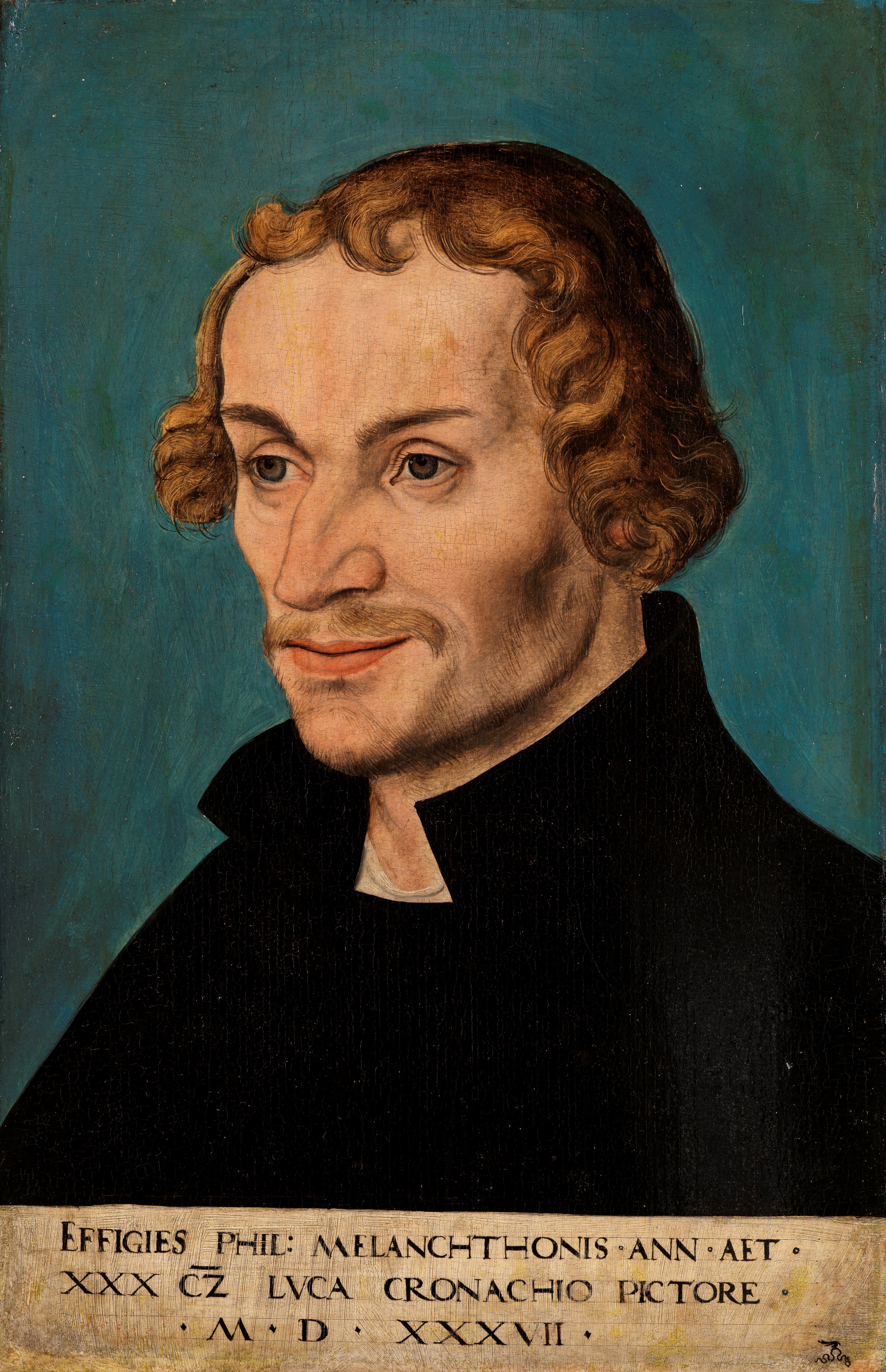 Philipp Melanchthon (eigentlich Schwarzerd/Schwartzerdt), Humanist, Theologe, Reformator und "Praeceptor Germania, Professor für griechische Sprache in Wittenberg, Autor, Freund und enger Mitarbeiter Luthers und auch des Erasmus